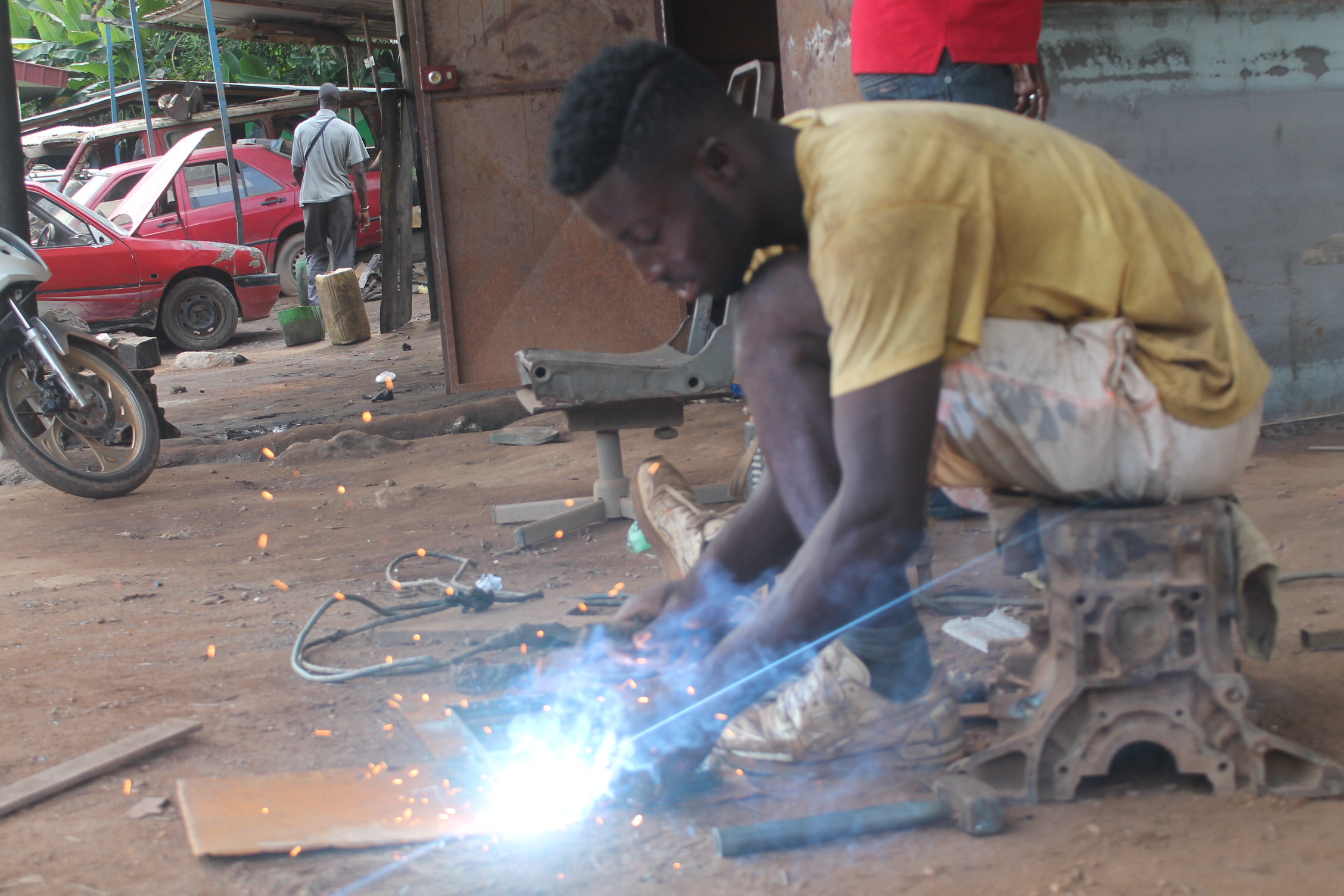 Le ferronnier, le professionnel du fer d'Aboisso. This is an image of "African people at work" from Ivory Coast